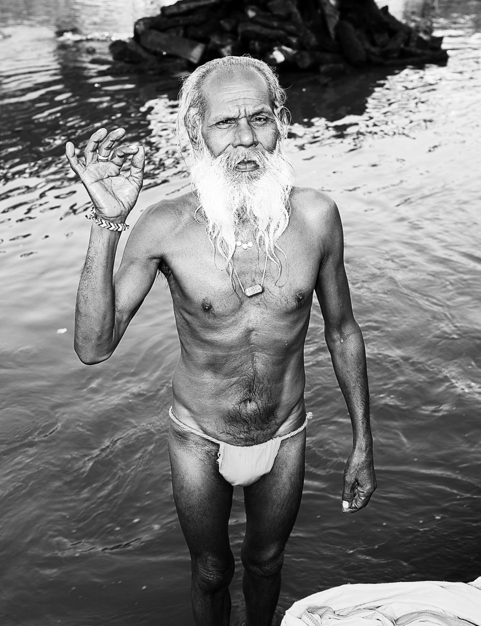 Tibet & Nepal